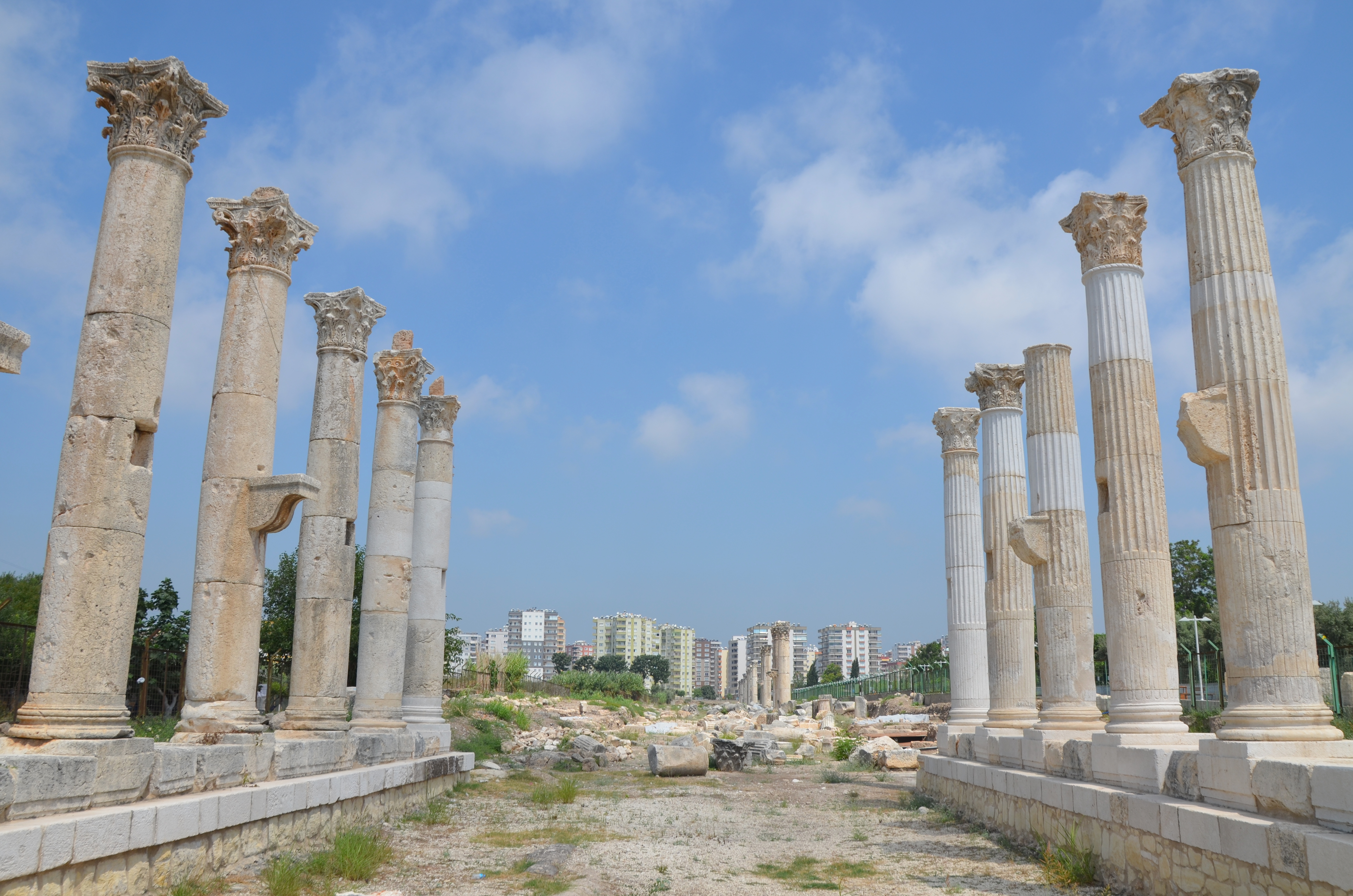 Soli/Pompeipolis, Turkey